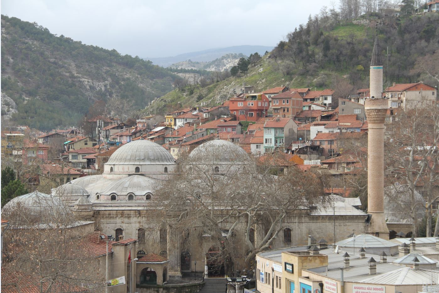 Kütahya Ulu Cami